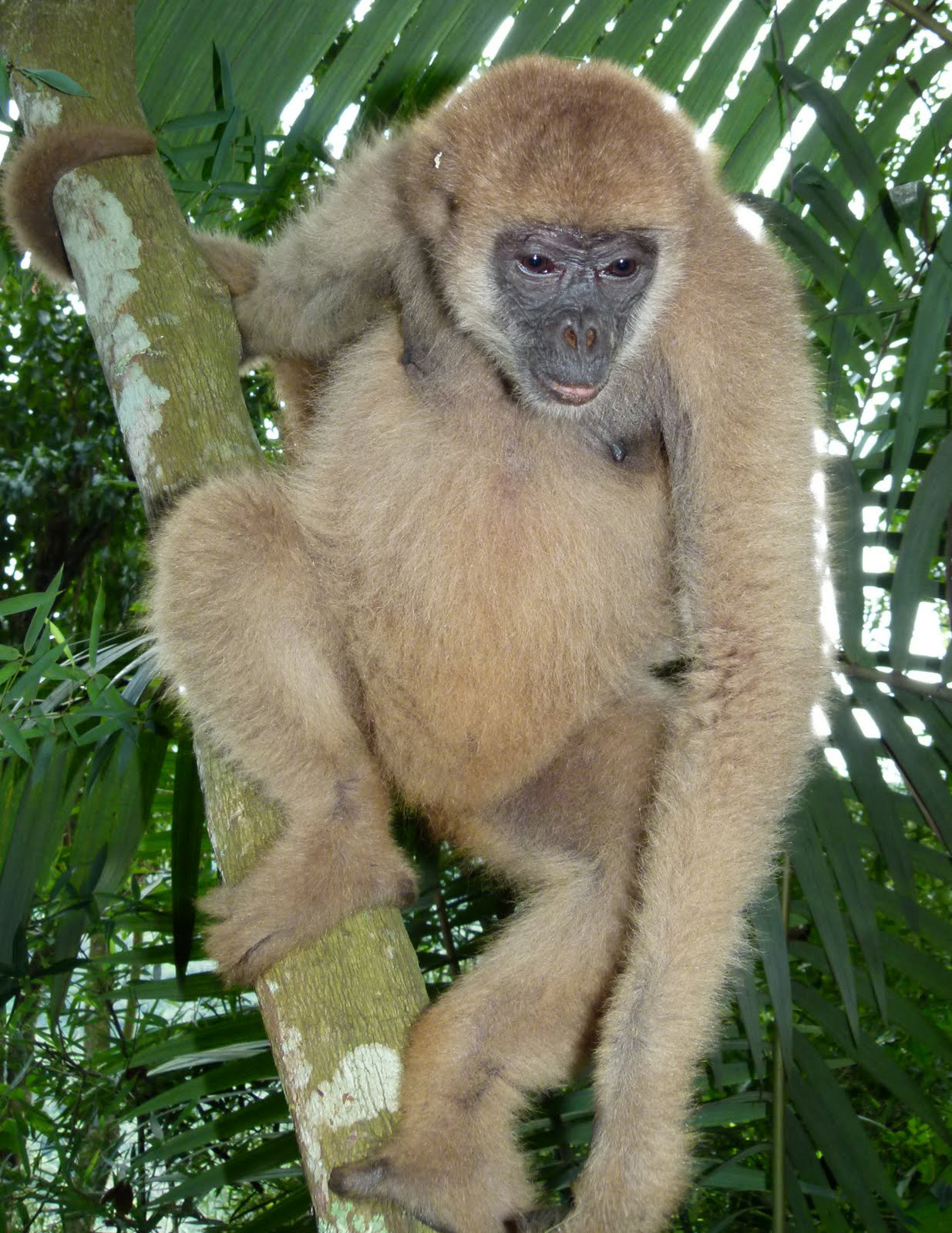 Fêmea de muriqui-do-sul ou mono-carvoeiro (Brachyteles arachnoides); encontrada doente em propriedade rural de Apiaí-SP (Brasil) e levada ao Zoo de Sorocaba.